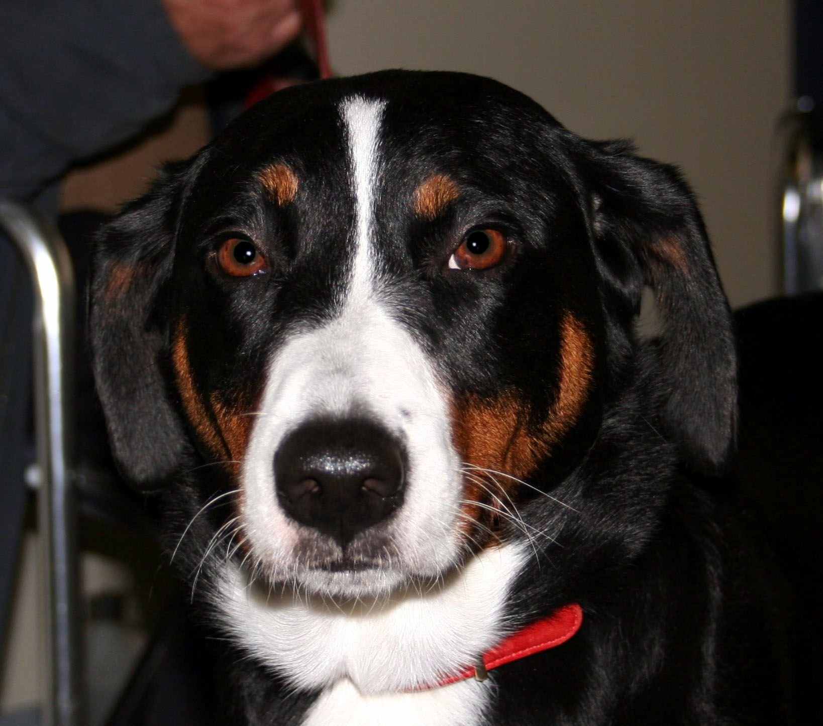 Appenzeller na Światowej Wystawie Psów Rasowych w Poznaniu